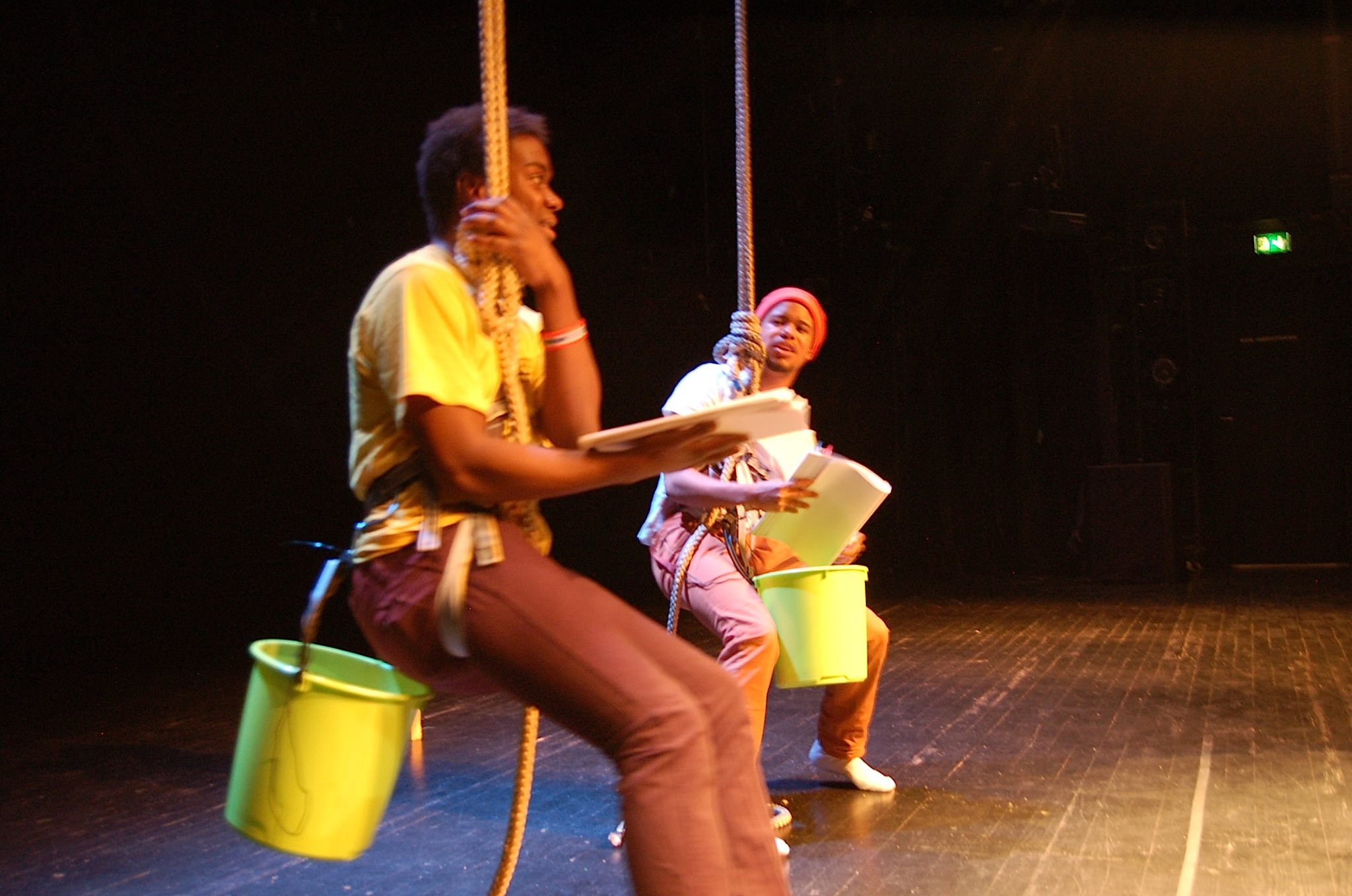 קריאה מבויימת של תלויים בתיאטרון Det Norske באוסלו, נורבגיה